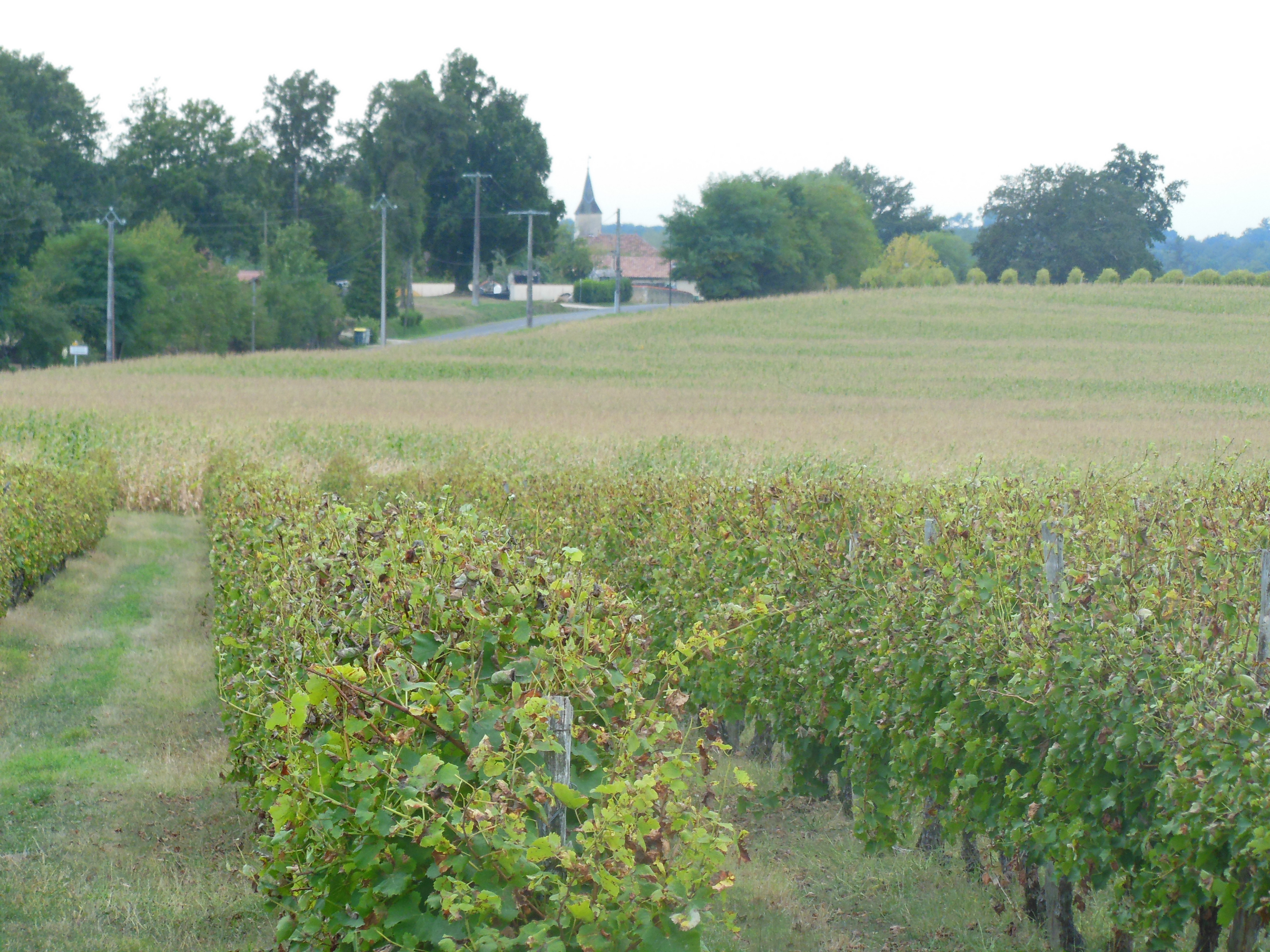 Vignoble d'Armagnac à Betbezer-d'Armagnac, dans le département français des Landes